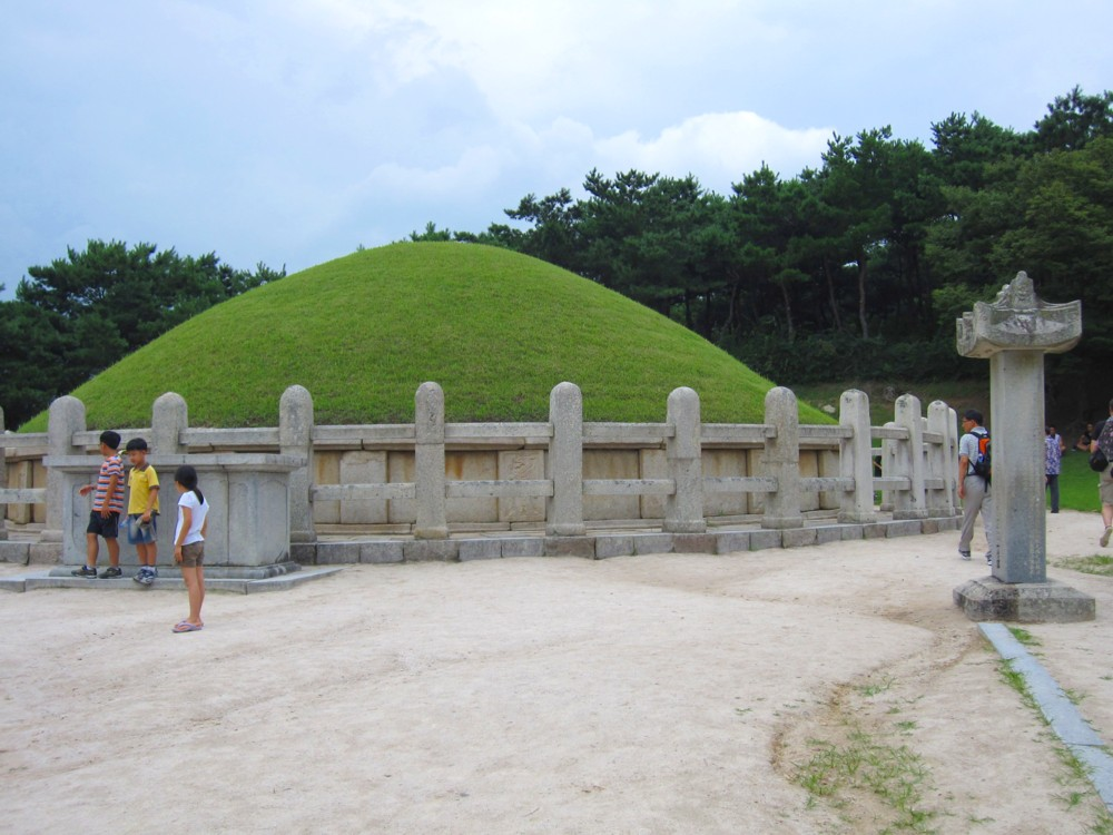 Gyeongju, siehe [1]